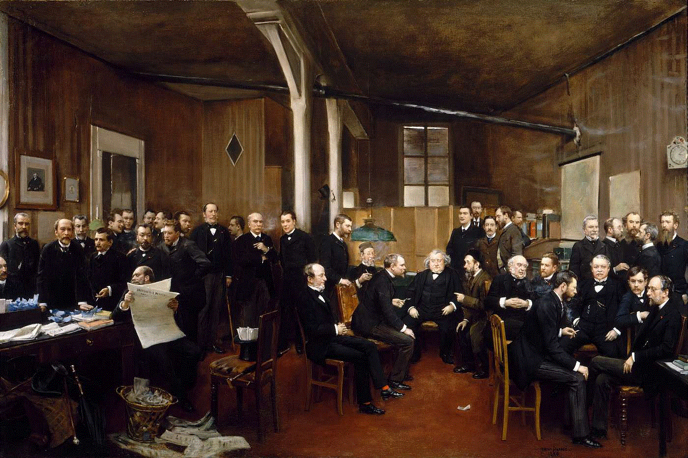 Jean Béraud (1849-1935). Characters on the picture are : french writer Paul Bourget (right, second seated fellow)